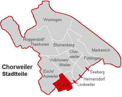 Lagekarte Pesch im Stadtbezirk Köln-Chorweiler